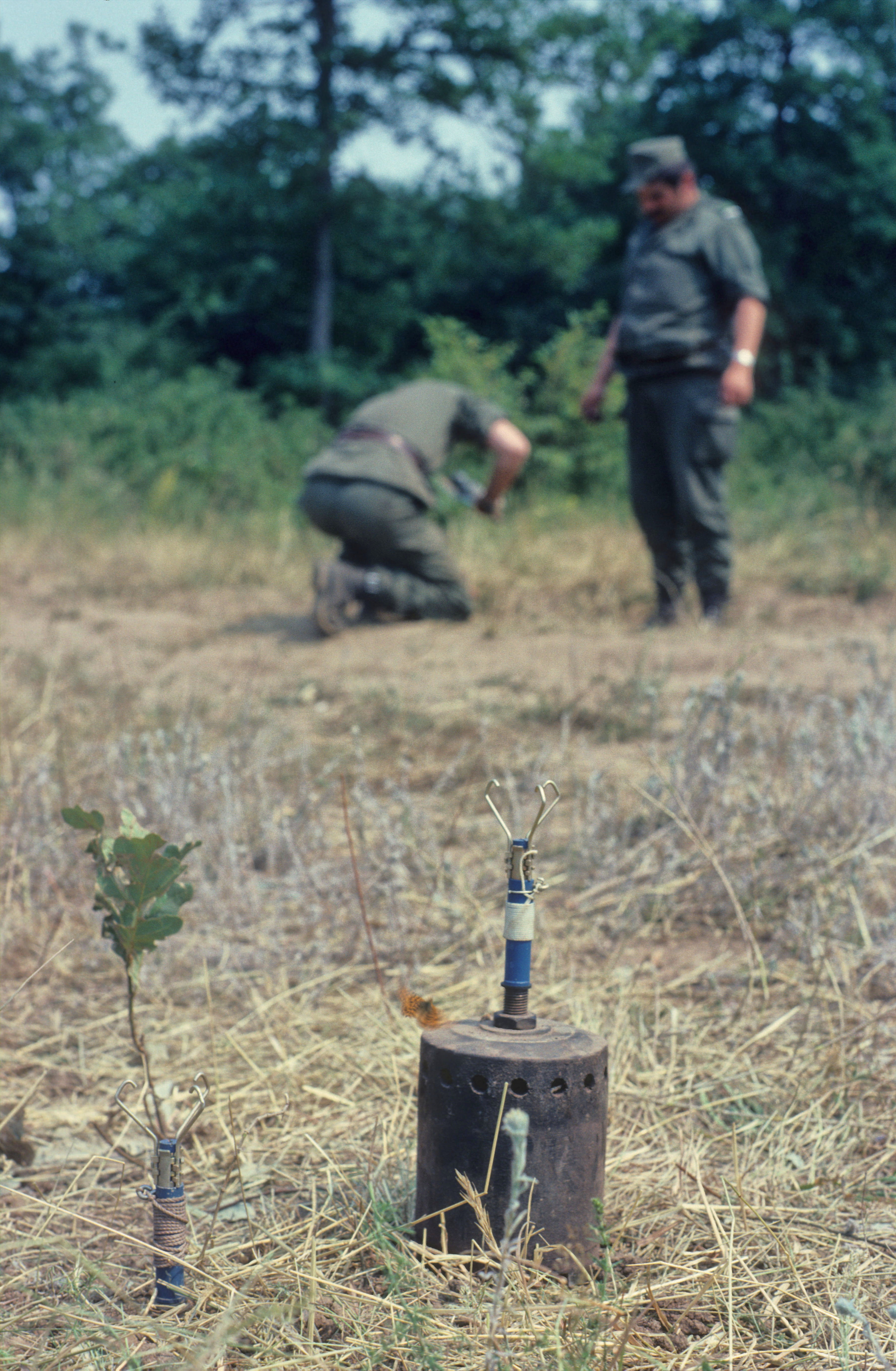 054 Mine APMB d'exercice